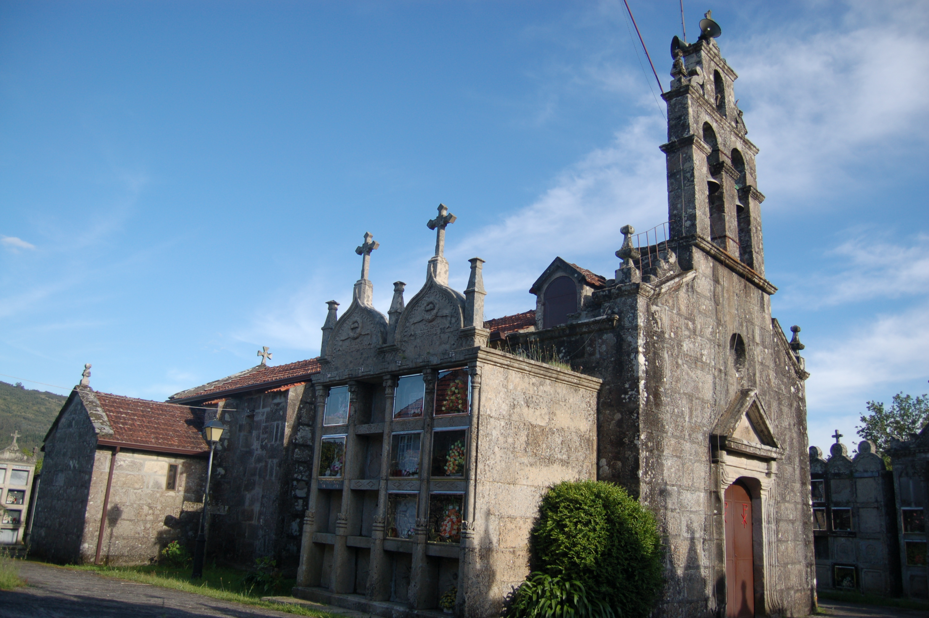 Igrexa parroquial de Santa María de Pazos (Pazos de Borbén)